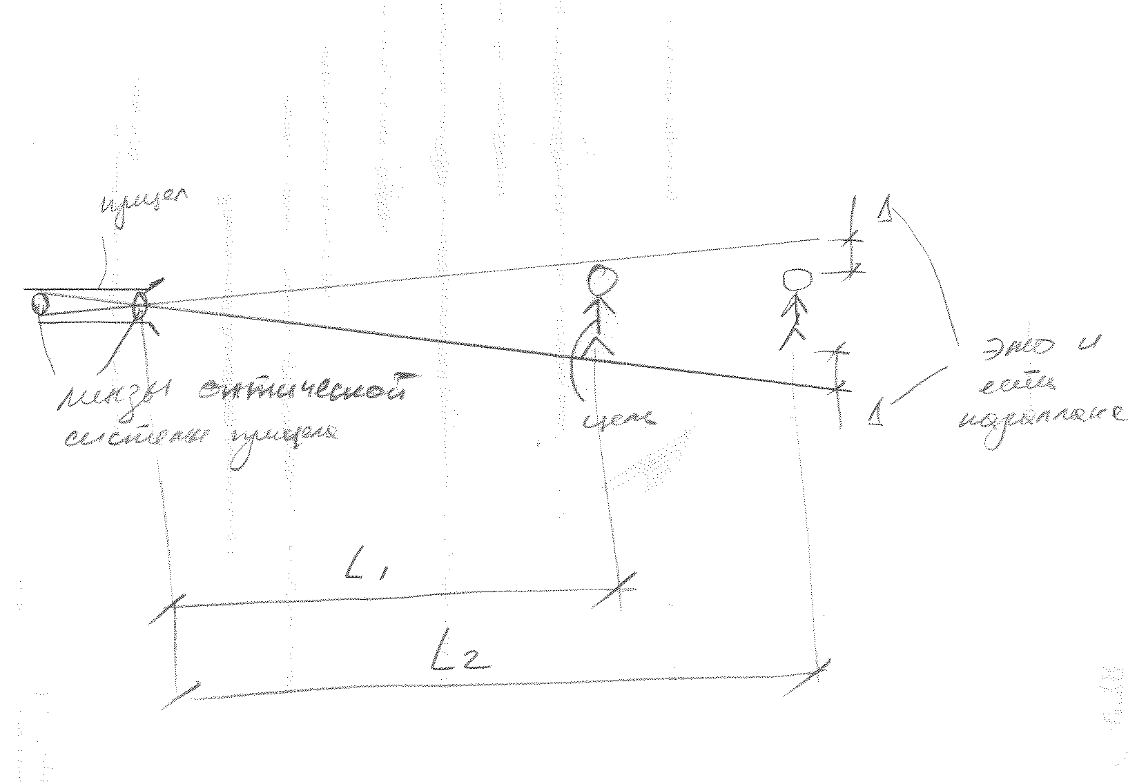 Оптический параллакс